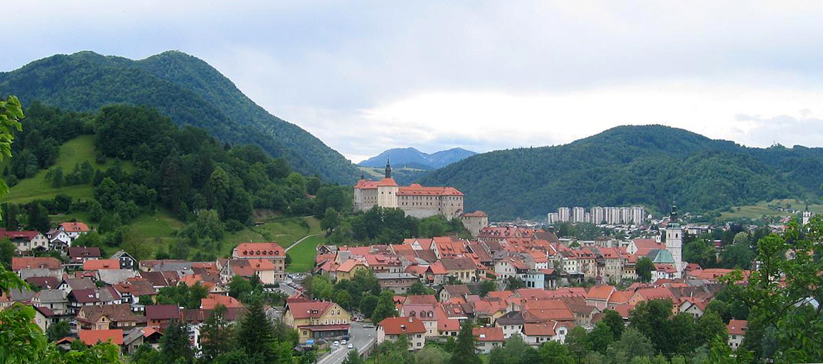 Škofja Loka, Slovenia photo:Ziga 09:53, 5 June 2006 (UTC)